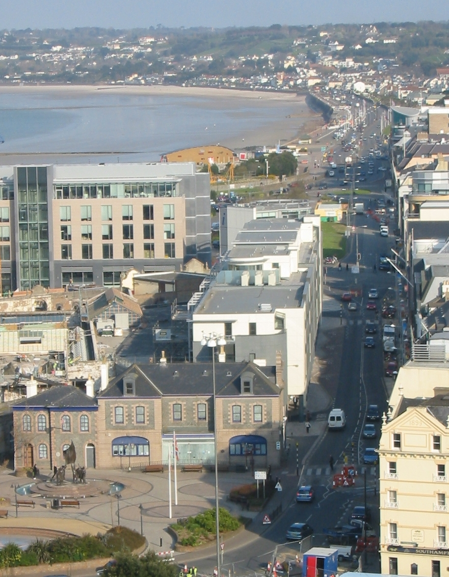 Nrf: Saint Hélyi, Jèrri